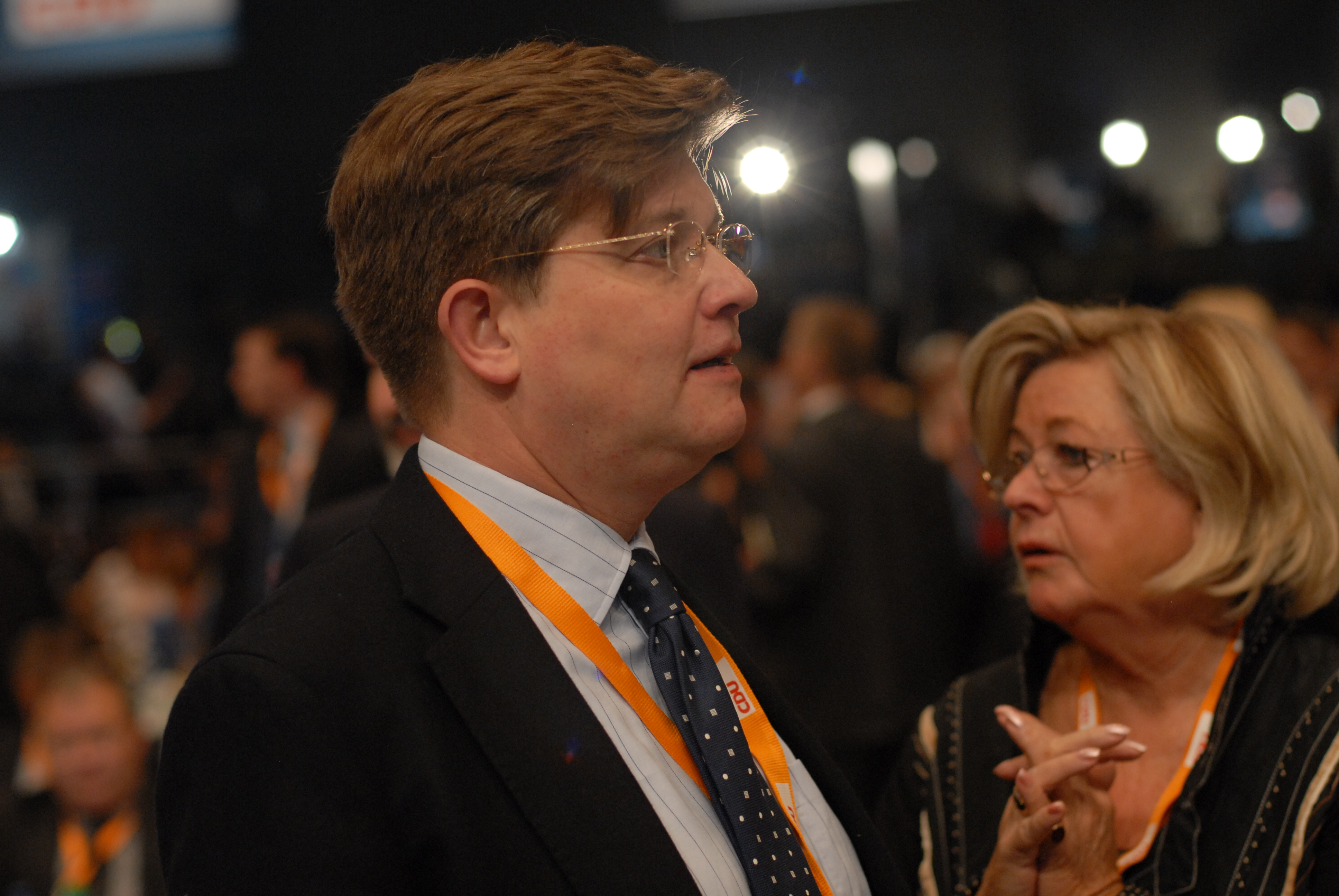 Eckart von Klaeden, Staatsminister im Bundeskanzleramt, auf dem CDU-Parteitag